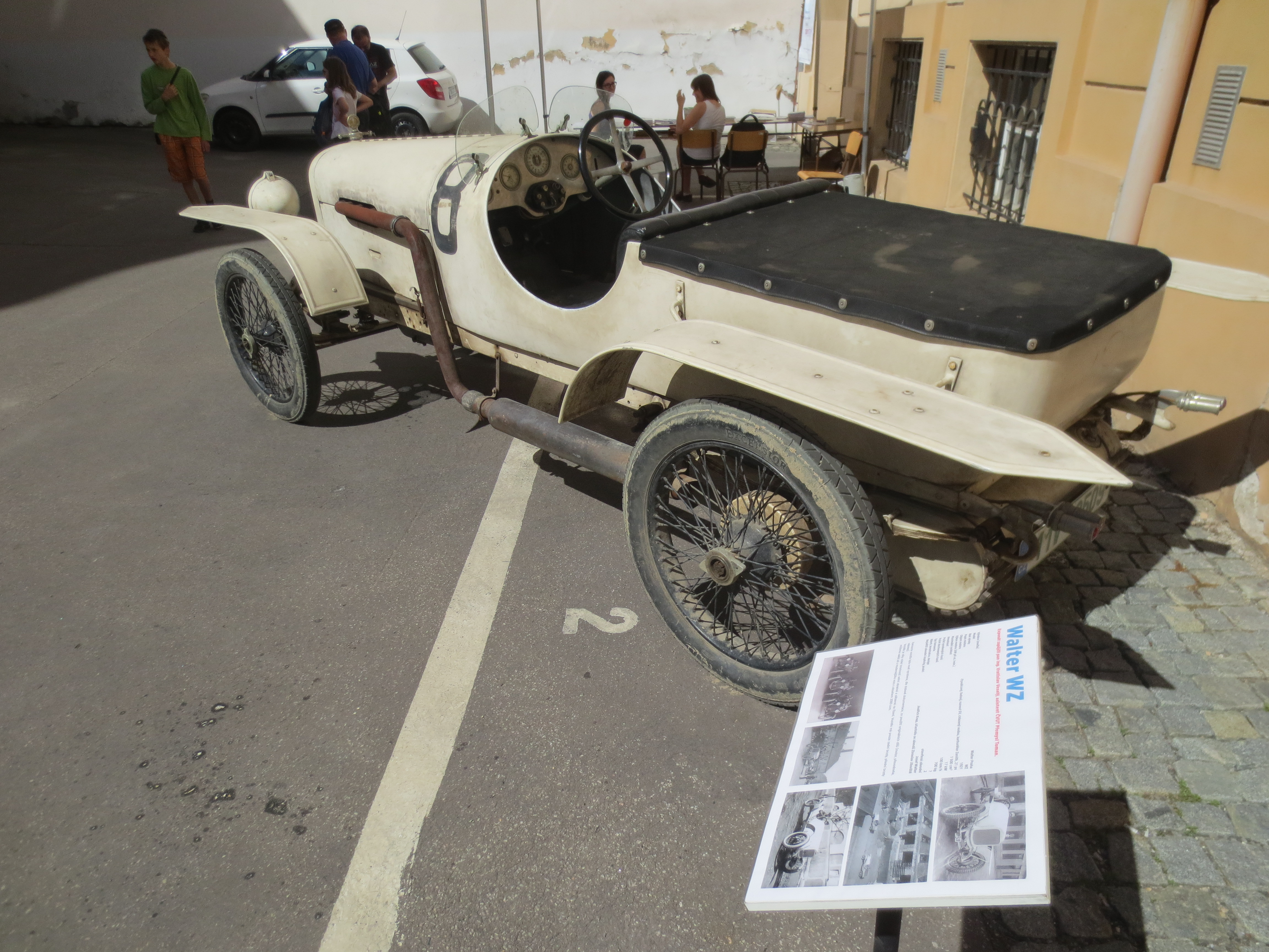 Walter WZ závodní, výstava sportovních automobilů ČVUT (2017)